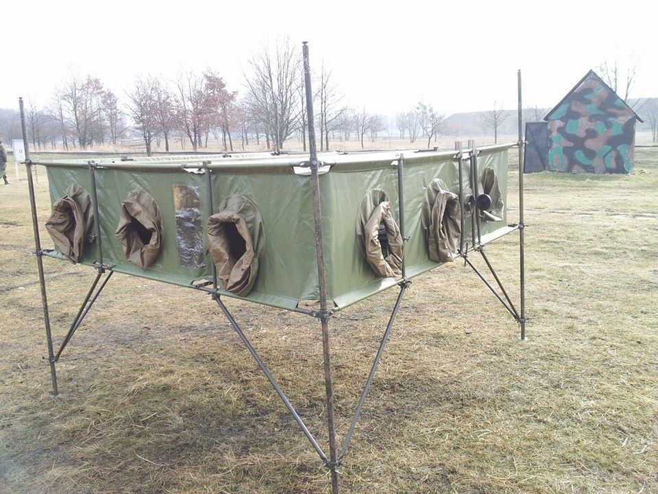 Widok narożny komory grupowej KG-12